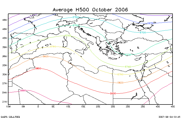 נוצר על ידי משתמש:Niv s